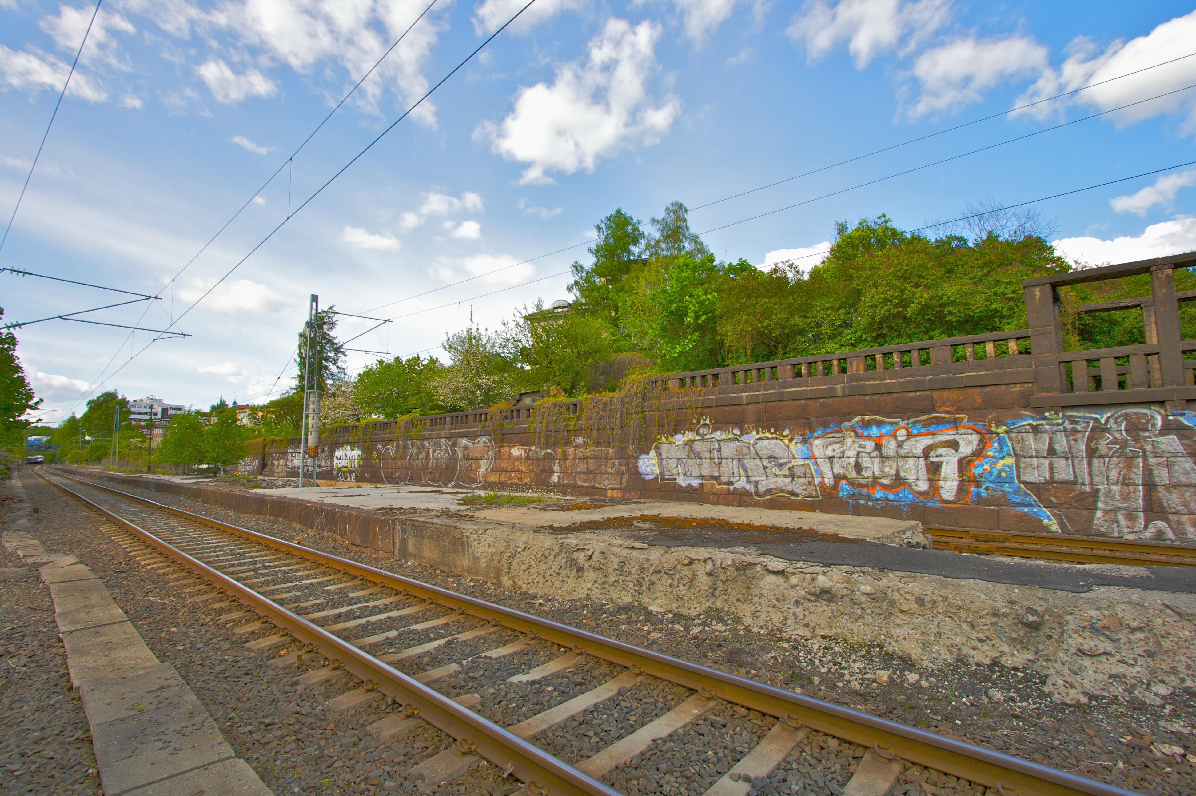 Restene av gamle Skarpsno stasjon.